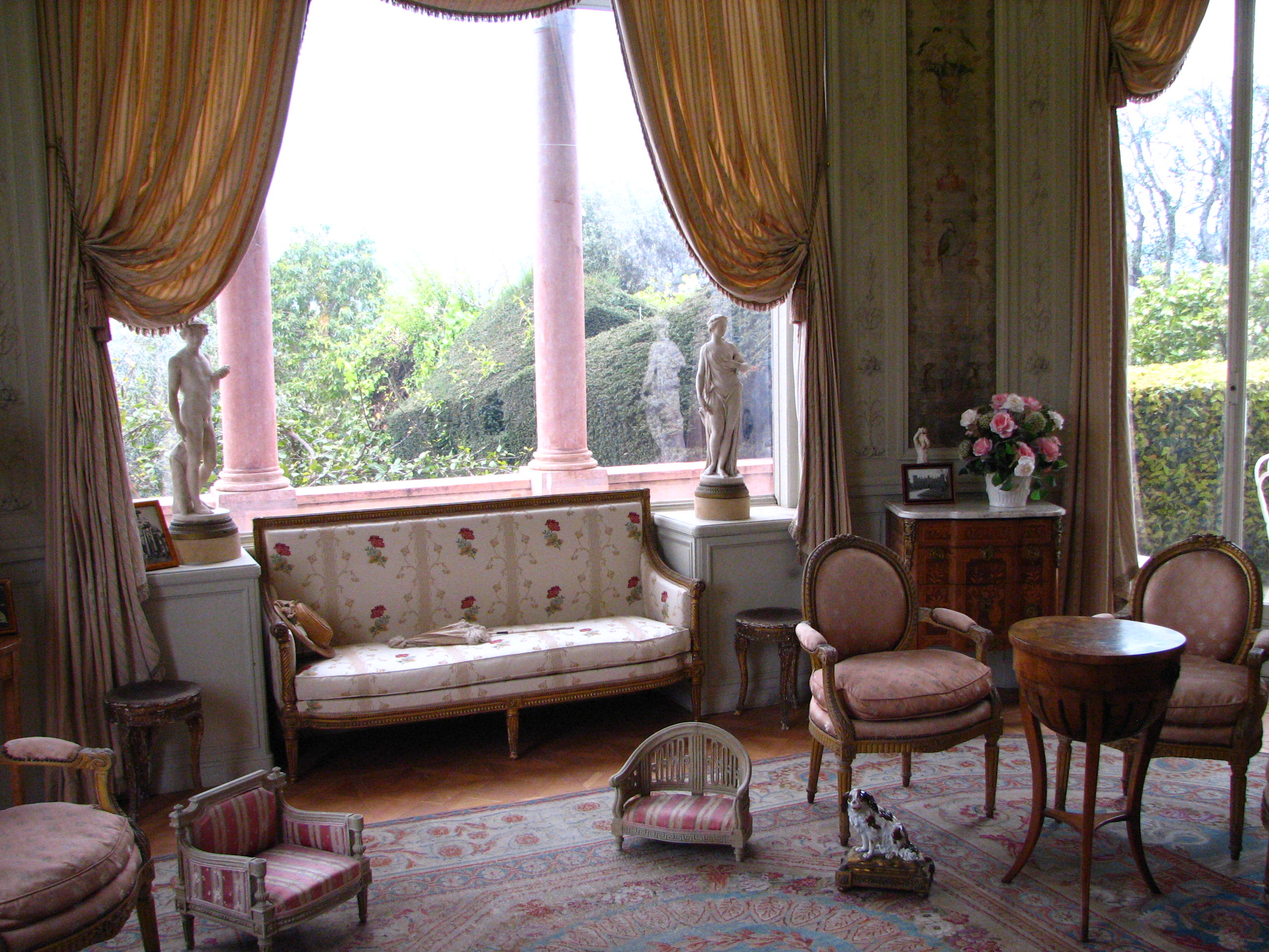 Chambre de Béatrice, vue intérieure de la Villa Ephrussi de Rothschild, Saint-Jean-Cap-Ferrat, France.